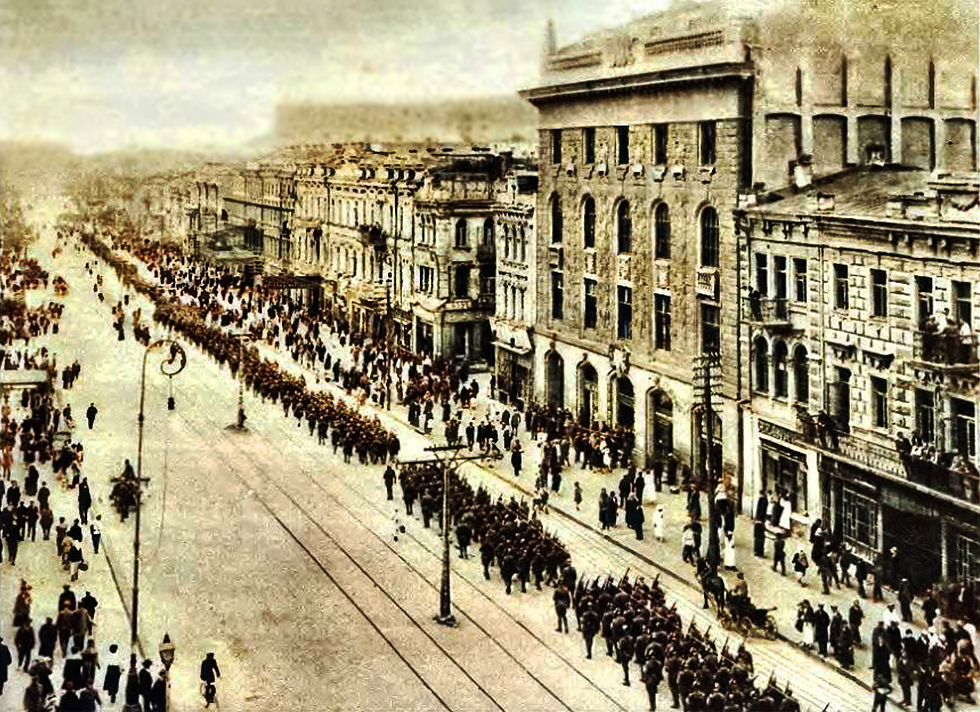 Парад на Хрещатику 1920